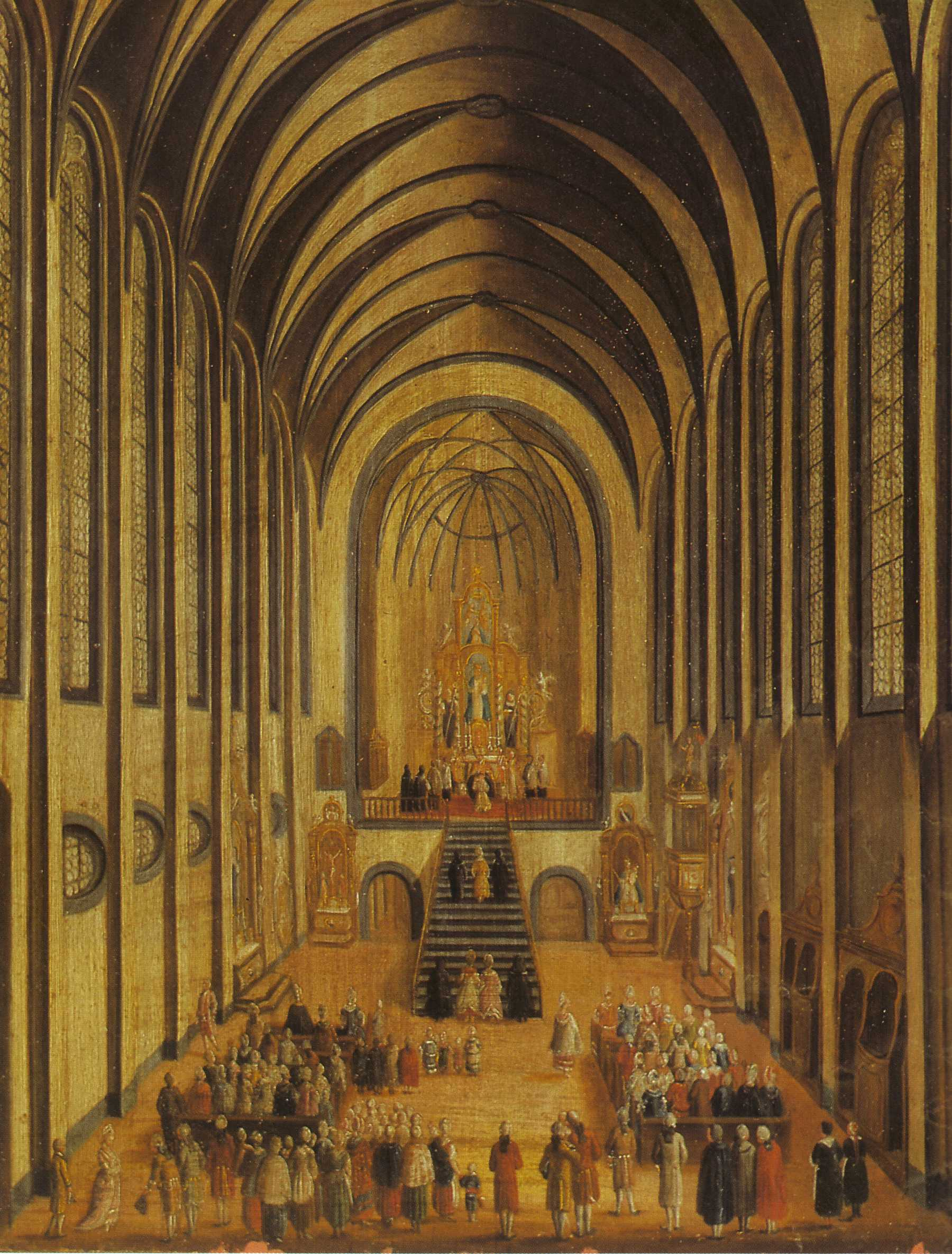 Innenansicht des Benediktinnerinnenkloster in Fulda